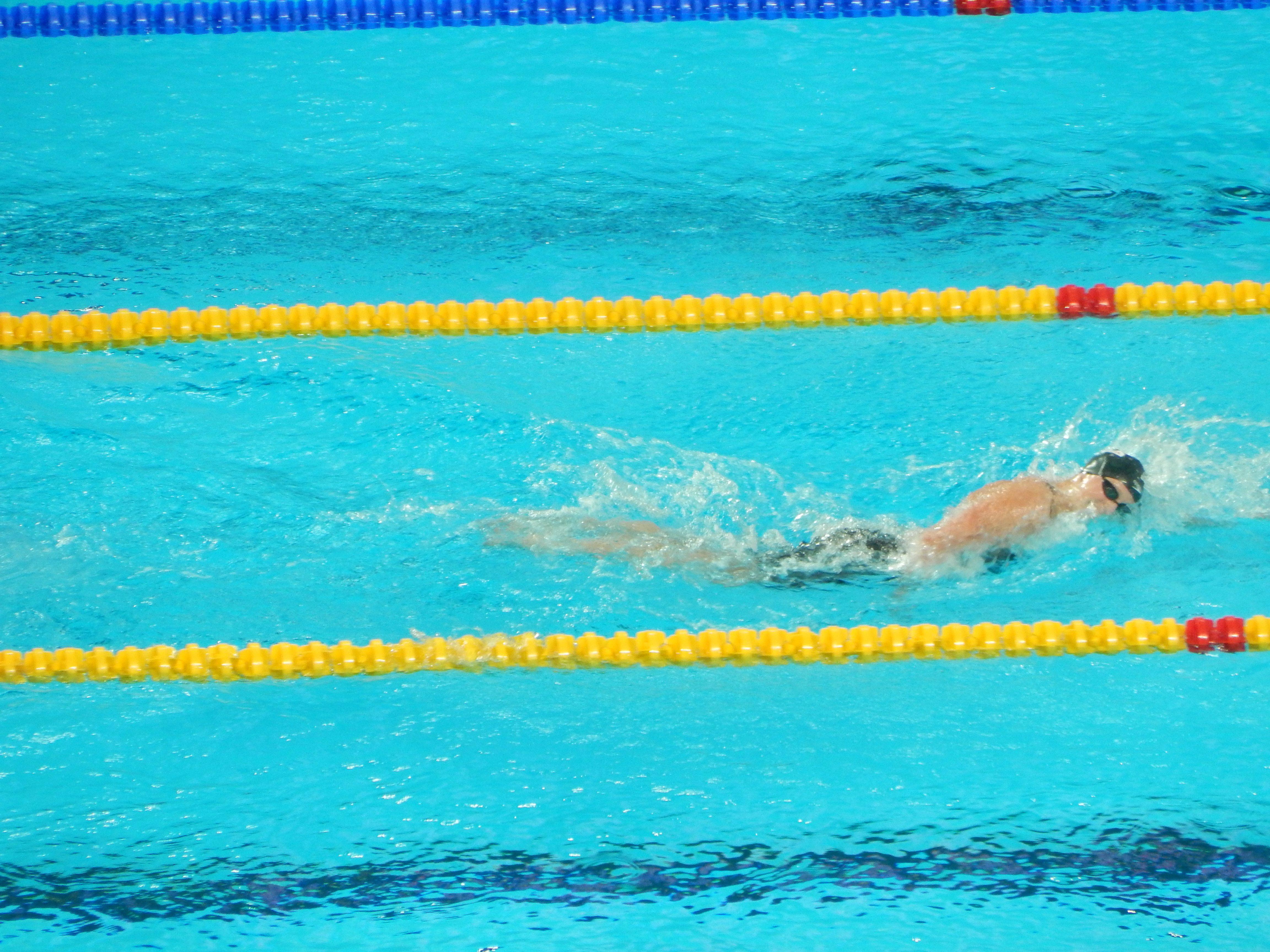 Кэти Ледеки плывёт к золоту чемпионата мира в Казани на 1500 метрах